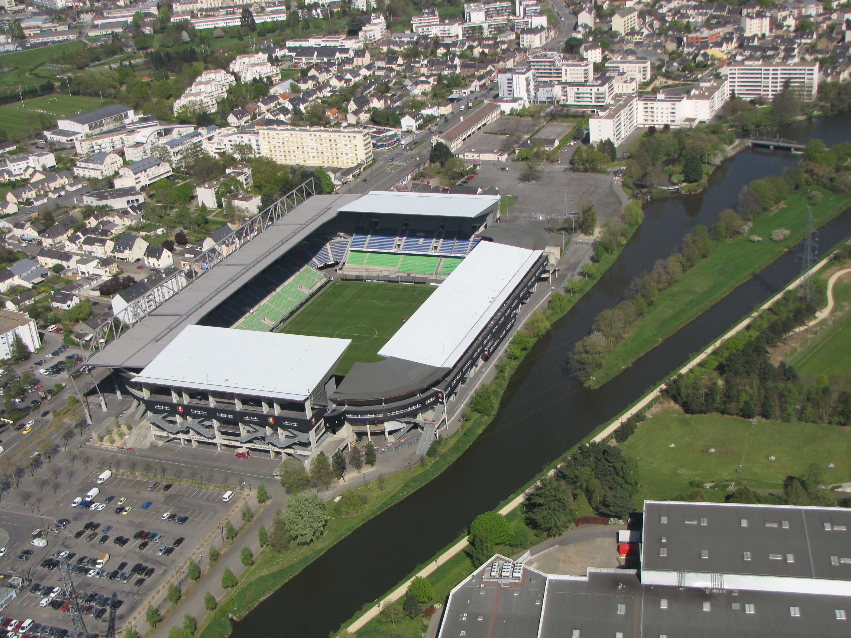 Stade de la route de Lorient